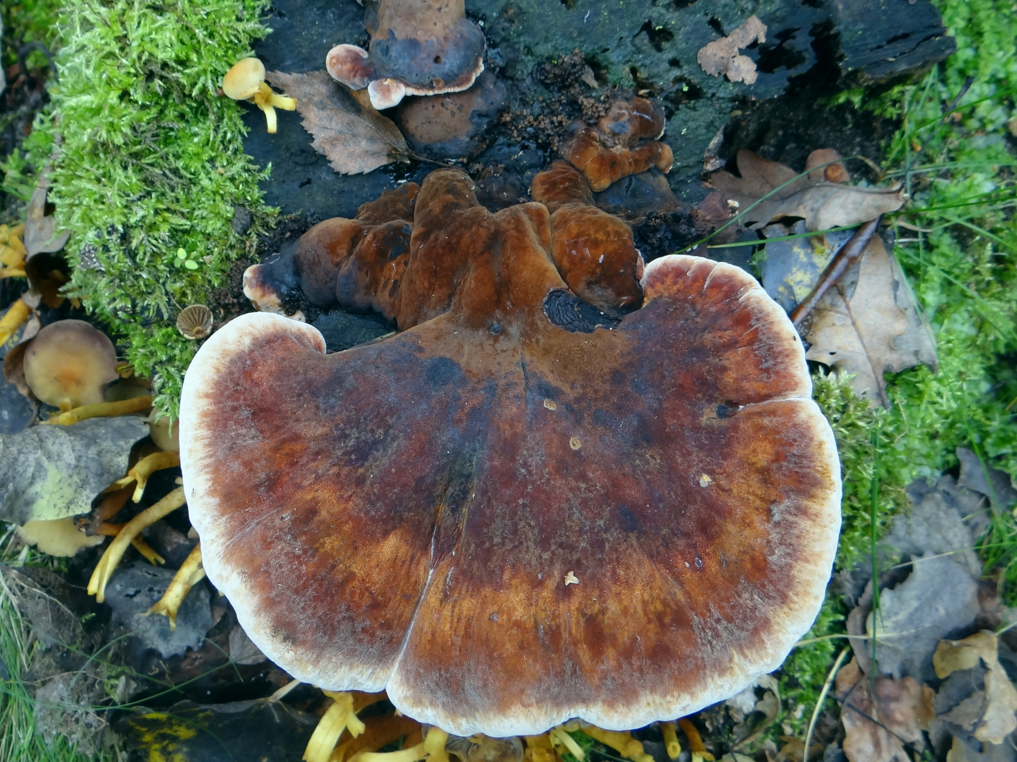 Ischnoderma resinosum (location: Poland, Borzęcin Dolny, Waryś)